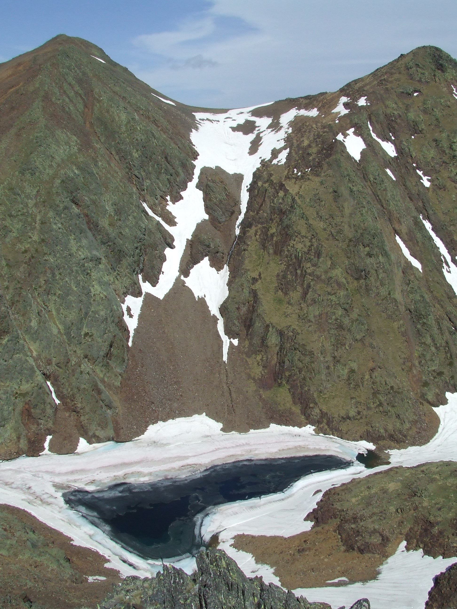 Estany Negre, Pic de Sanfonts & Agulla de Baiau taken from the slopes of Coma Pedrosa, Andorra